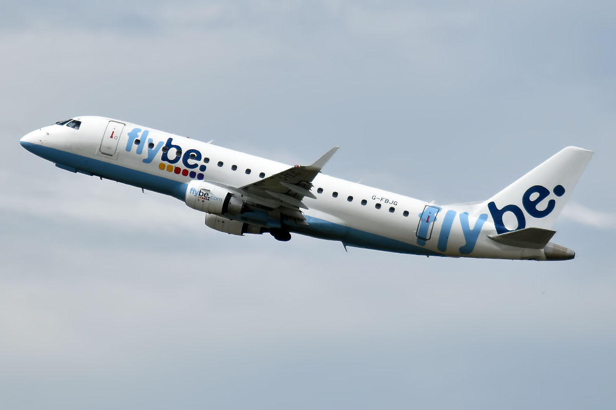 Flybe, G-FBJG, Embraer ERJ-175STD